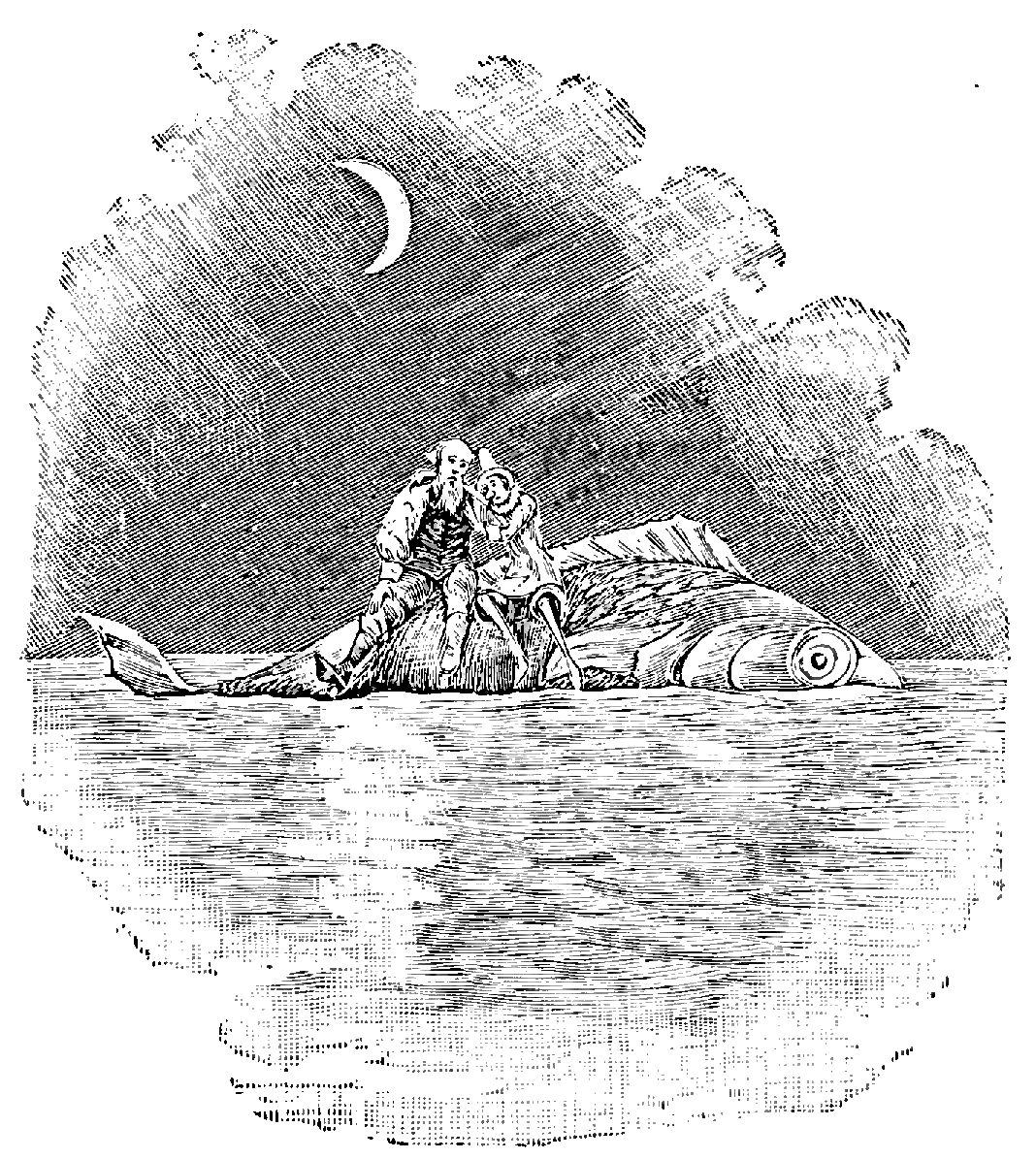 Illustrations from "Le avventure di Pinocchio, storia di un burattino", Carlo Collodi, Bemporad & figlio, Firenze 1902 (Drawings and engravings by Carlo Chiostri, and A. Bongini)